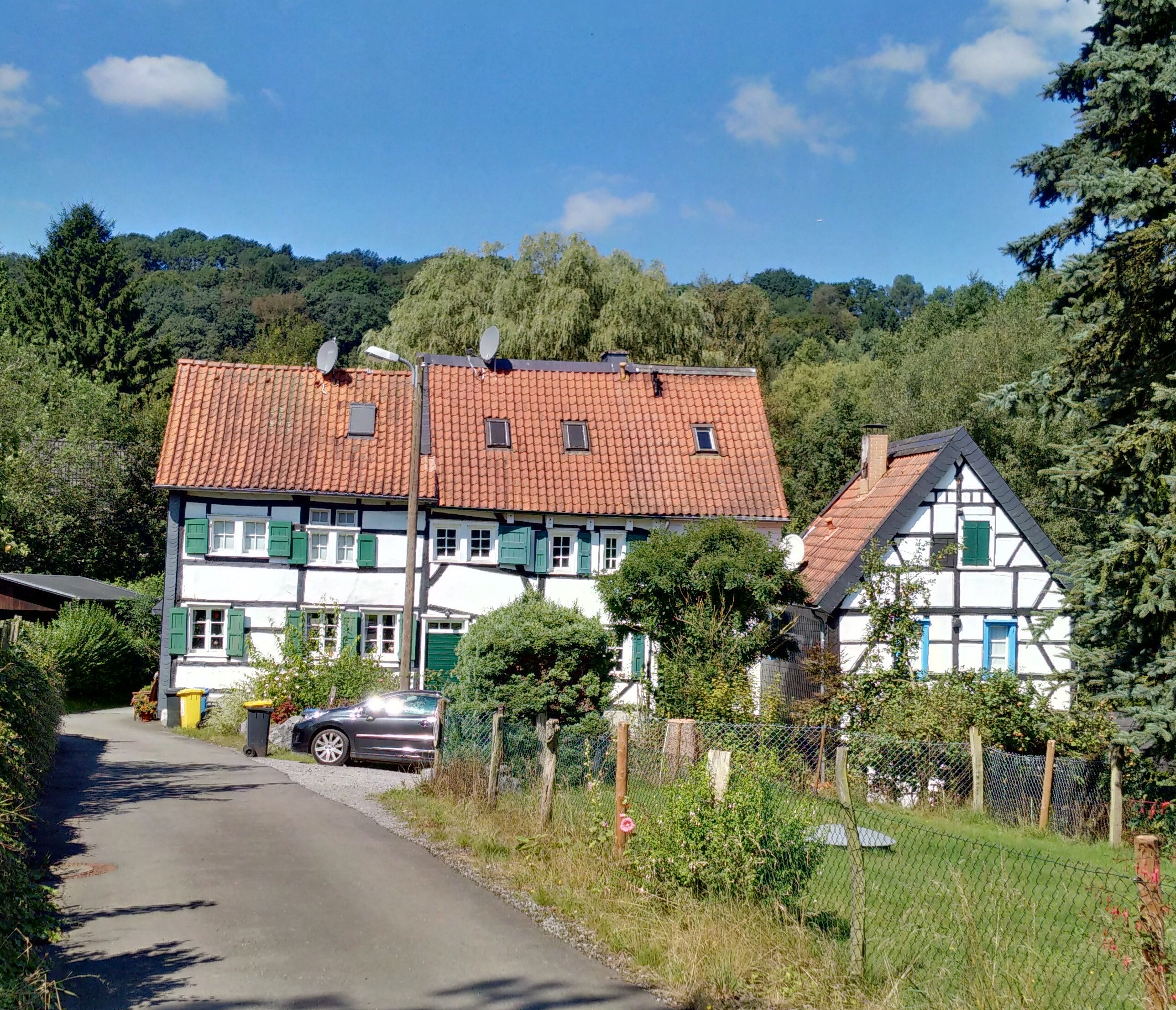 Baudenkmal Külf 21 bis 25 in Solingen, aufgenommen im Sommer 2016